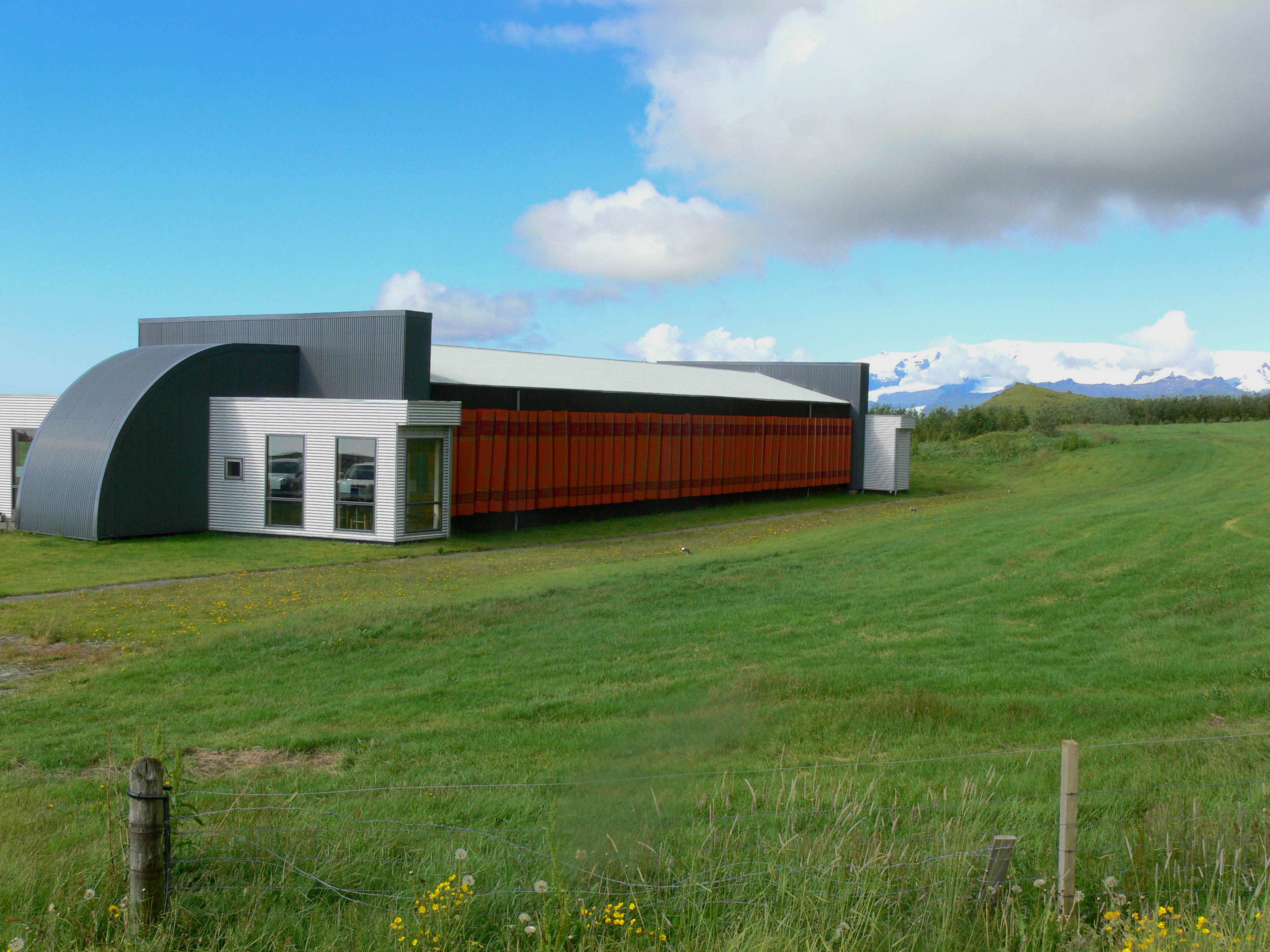 Das Museum am Hof Hali in Island zwischen Jökulsárlón und Suðursveit. Geburtsort des Dichters Þórbergur Þórðarson (1889-1974)